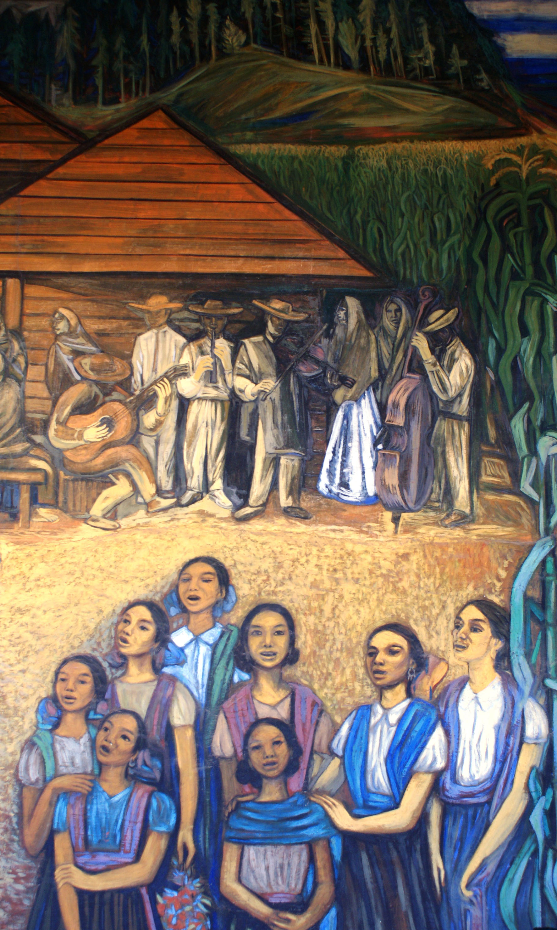 Fragmento de pintura mural Titulo del mural: “Gente y paisaje de Michoacán” Autor: Alfredo Zalce Año: 1962 Ubicación: Palacio de Gobierno de Michoacán Morelia, Michoacán, México.